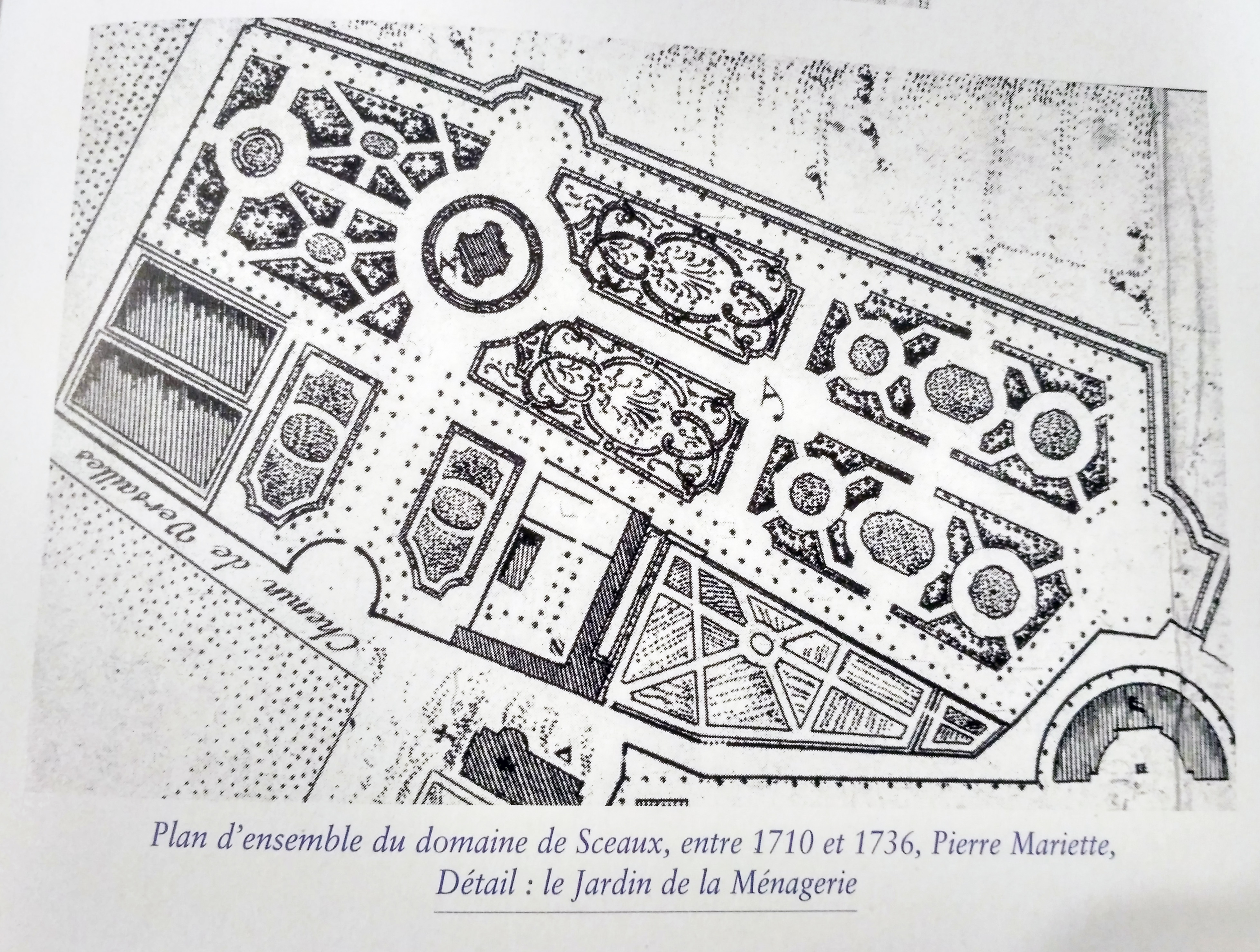 Le jardin de la ménagerie au début du 18e siècle, plan détaillé tiré d'un plan du domaine de Sceaux réalisé par Pierre Mariette